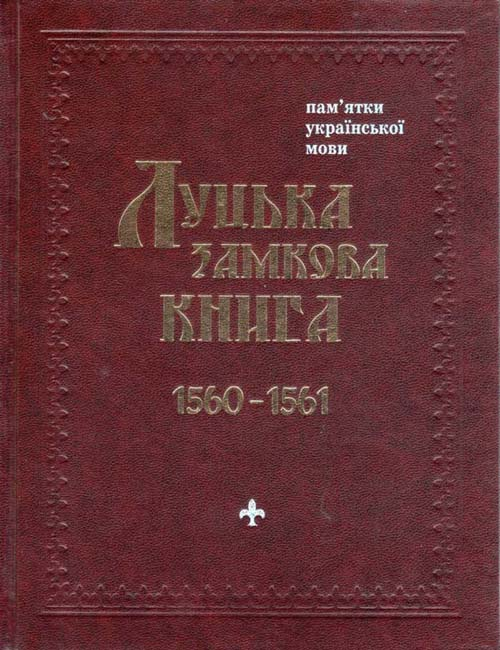 Обкладинка книги: Луцька замкова книга 1560-1561 рр. — Луцьк, 2013.